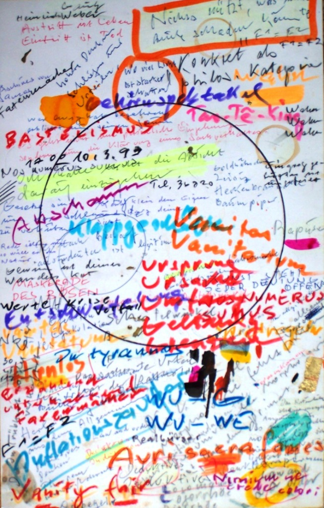 Kreisbild von M. Luther (Zur Folge: Cogito ergo sum)